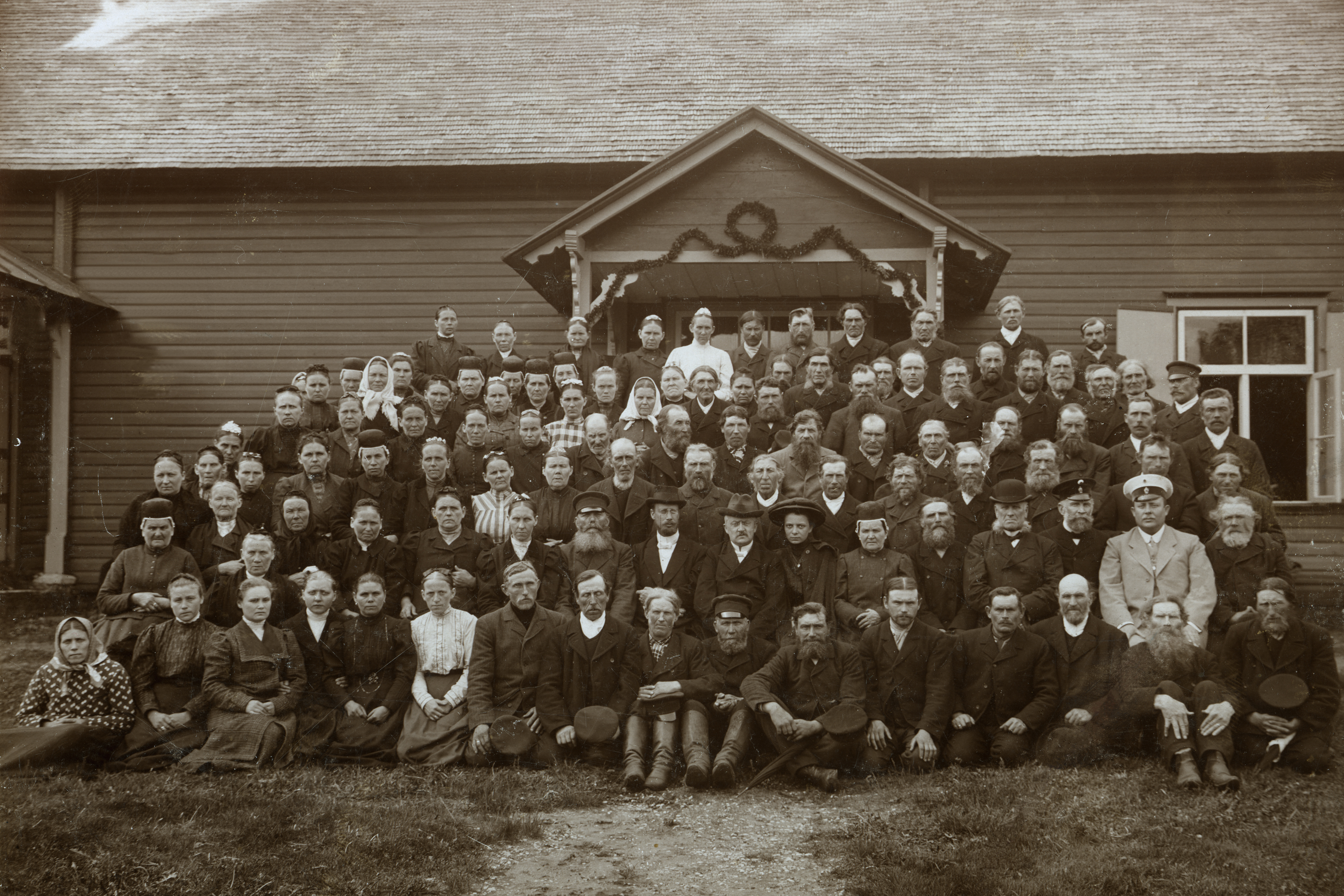 Keila palvemaja rahvas